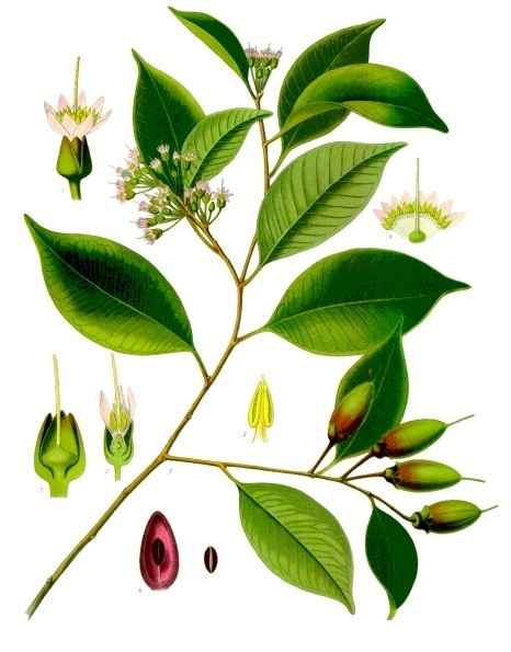 Payena leeri. A blühender und fruchttragender Zweig natürlicher Grösse. 1 Blüte von der Seite 2/1; 2 Blüte halb durchschnitten; 3 Fruchtknoten 9/1; 4 Corolle aufgeschnitten 3/1; 5 Staubgefäss stark vergrössert; 6 Frucht aufgeschnitten 1/1; 7 Samen 1/1.